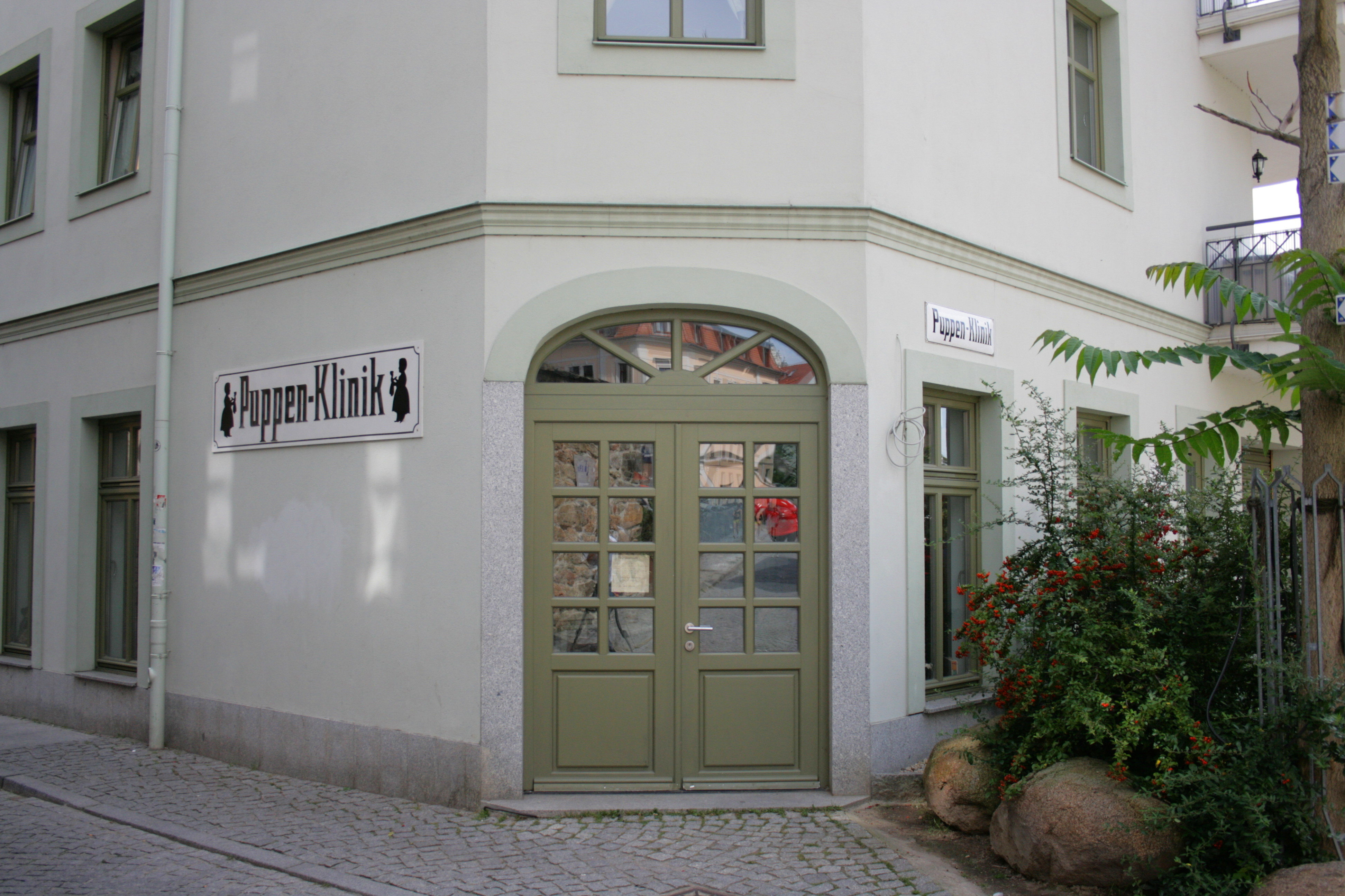 Heringstraße 21 in BautzenHornjoserbsce: Budyšin; Jerjowa čo. 21